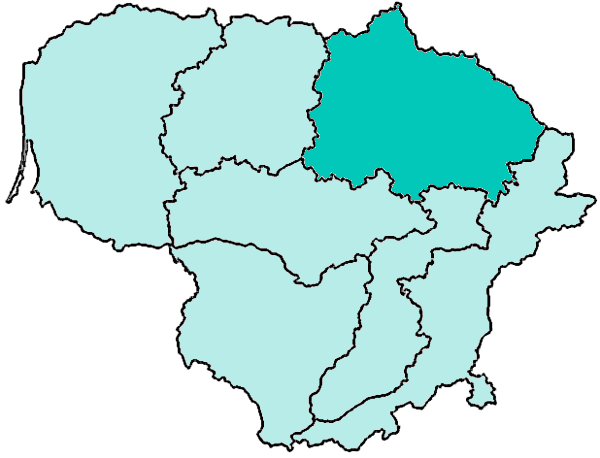 Mappa della diocesi cattolica di Panevežys, in Lituania.